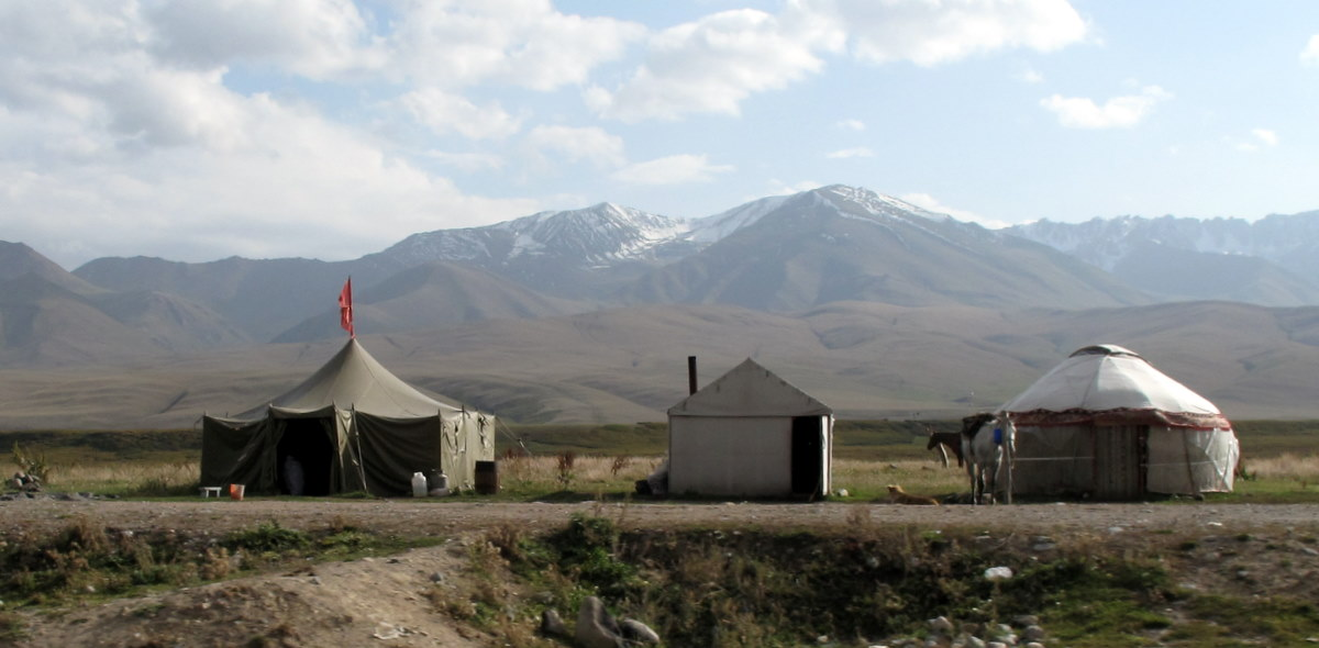 Suusamyr Valley